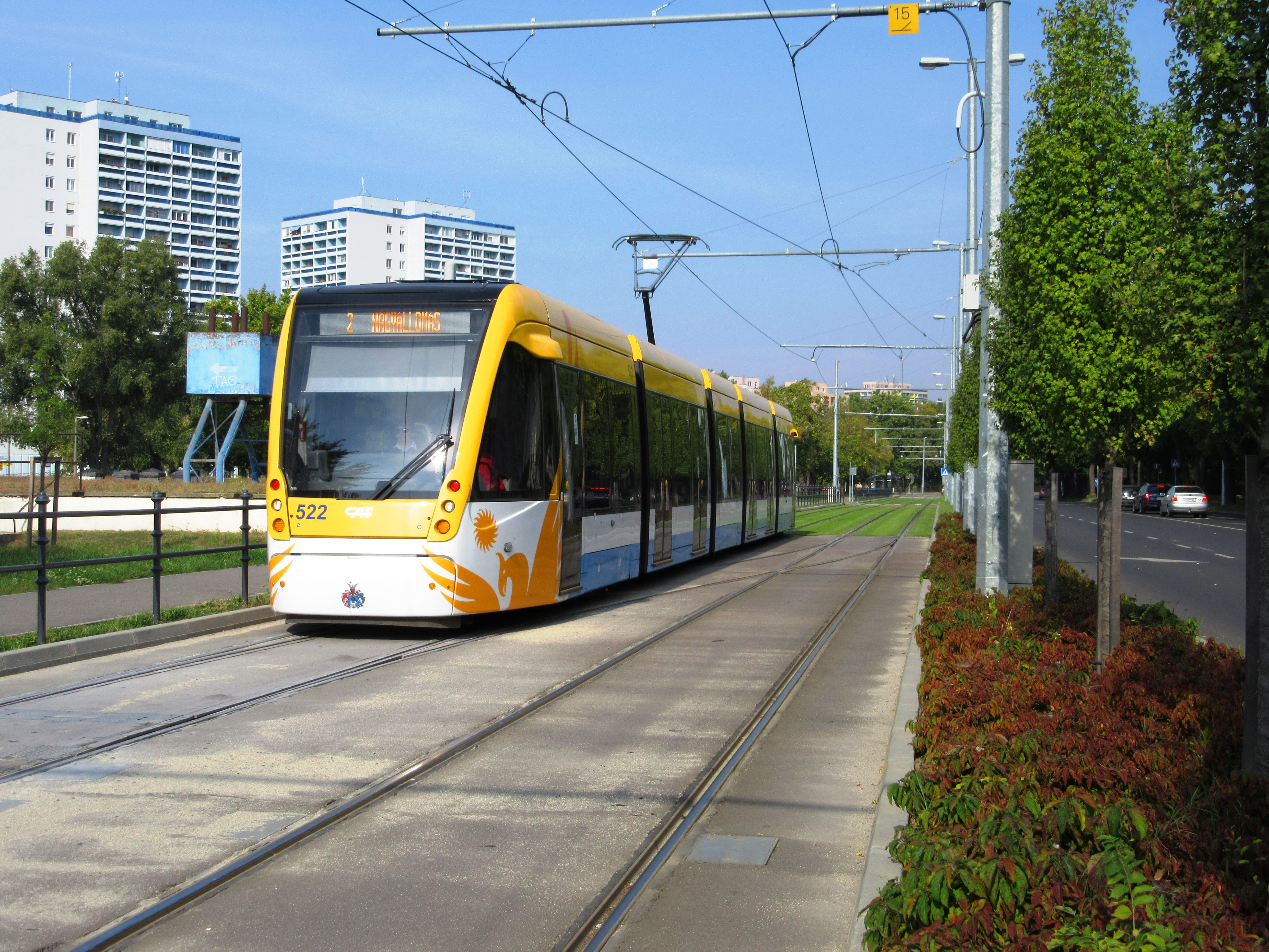 2-es villamos, Thomas Mann utca